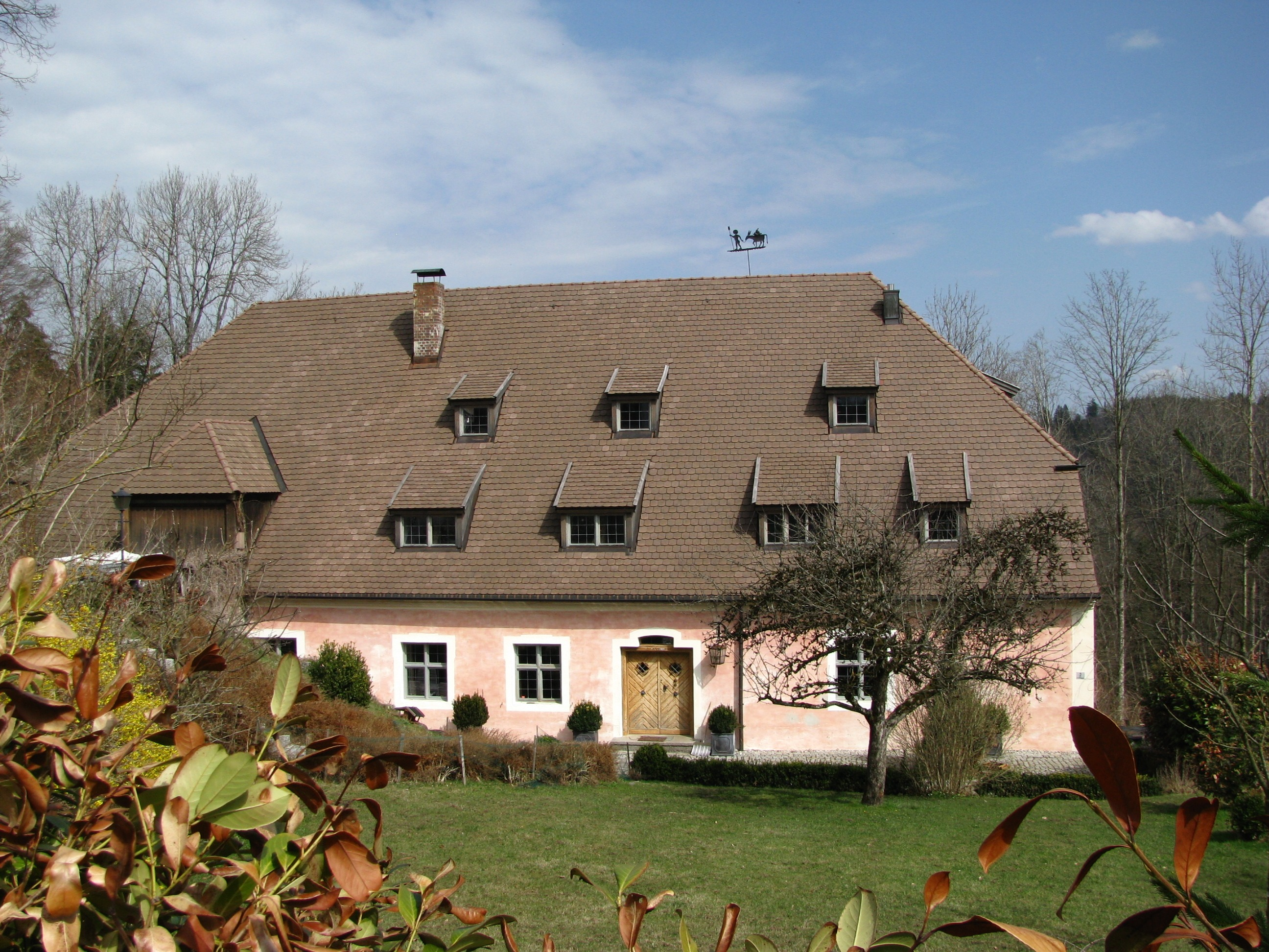 Pfistermühle in Rottenbuch; Ansicht von Westen